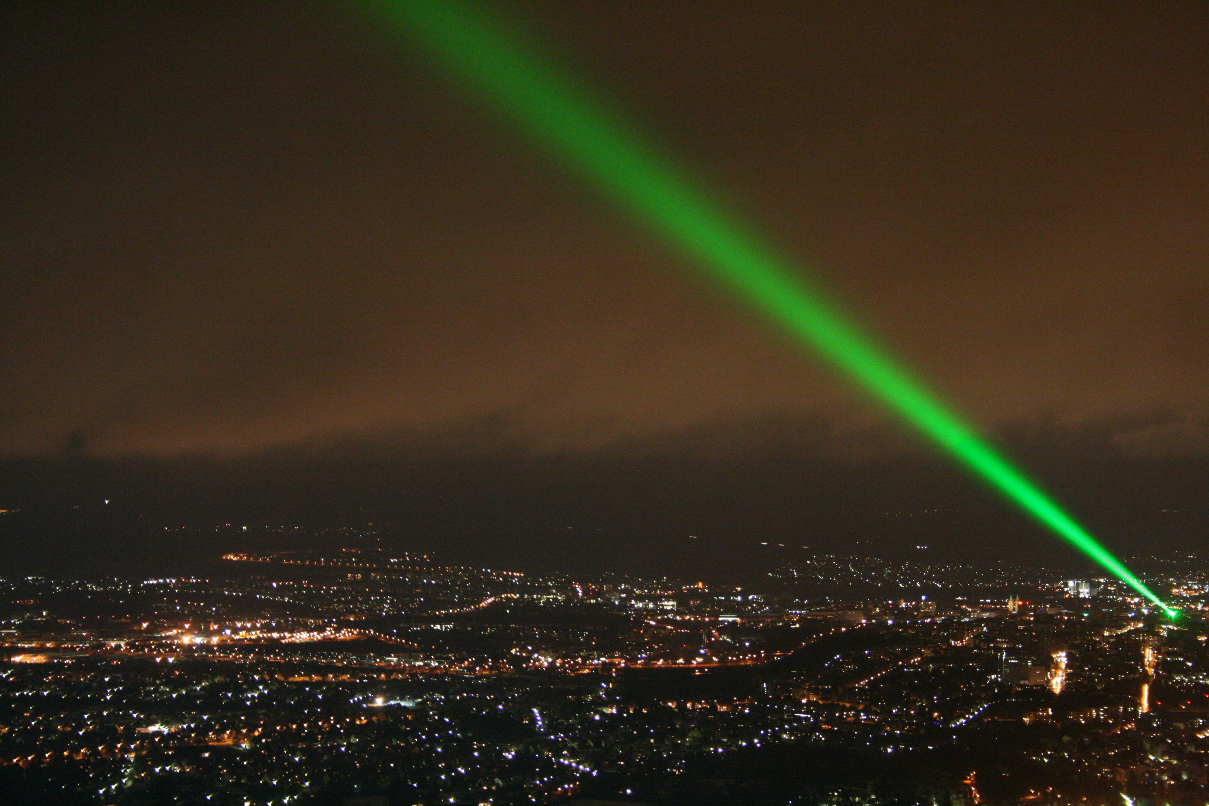 LaserScape Kassel im November 2008 bei Nacht .